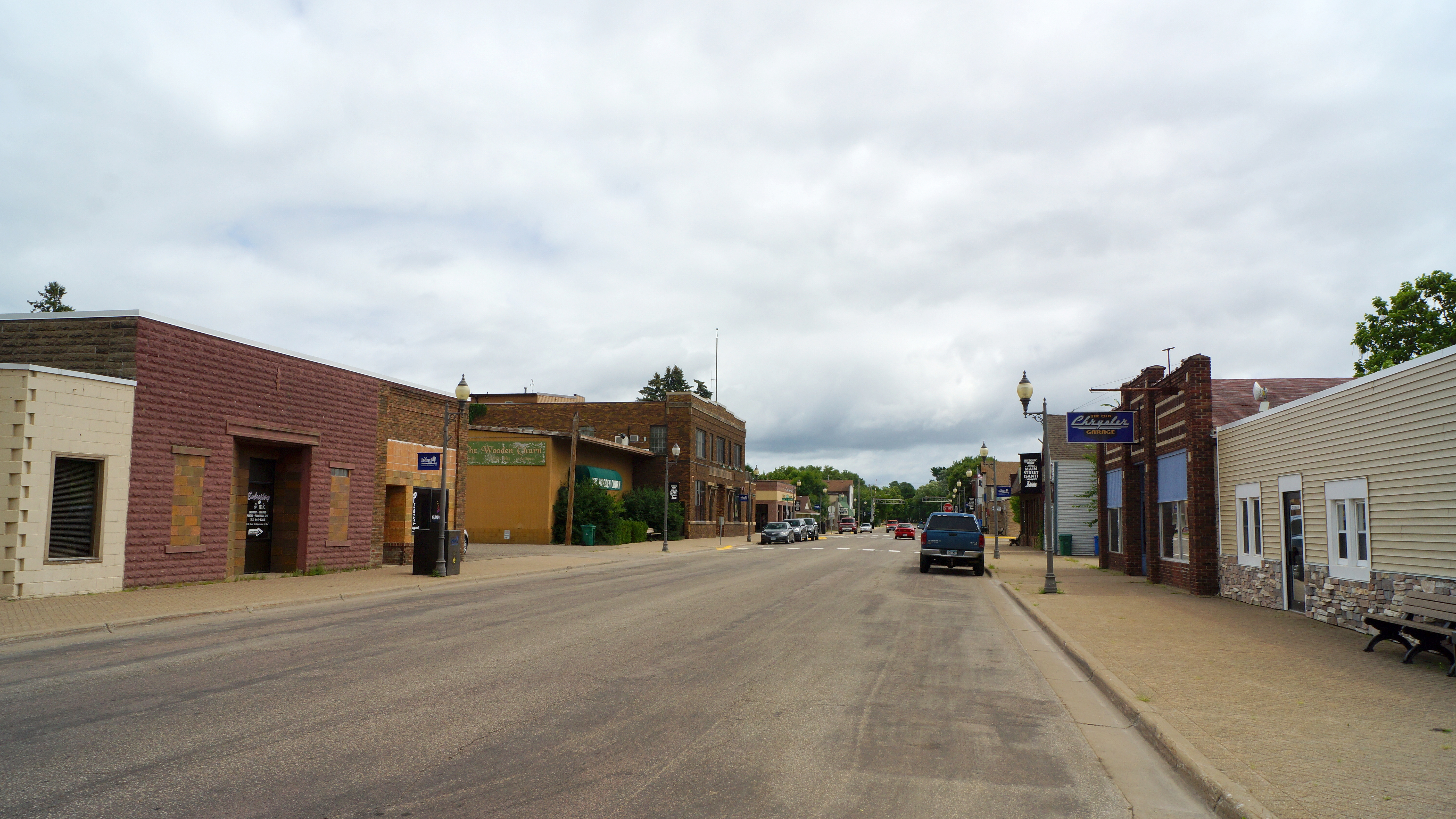 Main Street in Isanti, Minnesota.